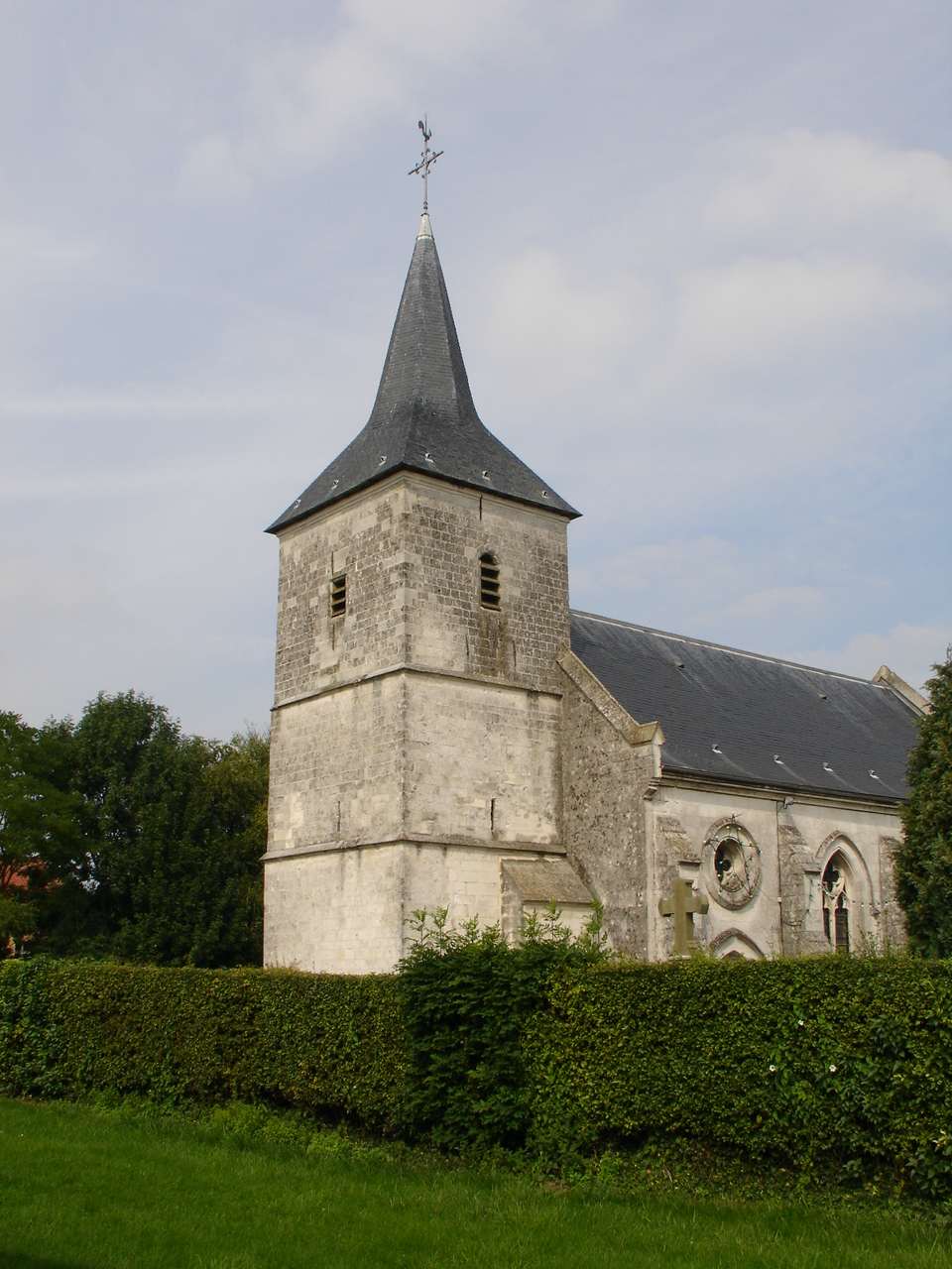 Église d'Alquines